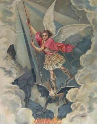 Popis: Michal archanjel, autor neznámy Zdroj: obraz v kostolíku v Dražovciach Dátum: 19.10.2005 Autor: Miroslav Vančo Povolenie: PD Iné verzie tohto súboru: Nie